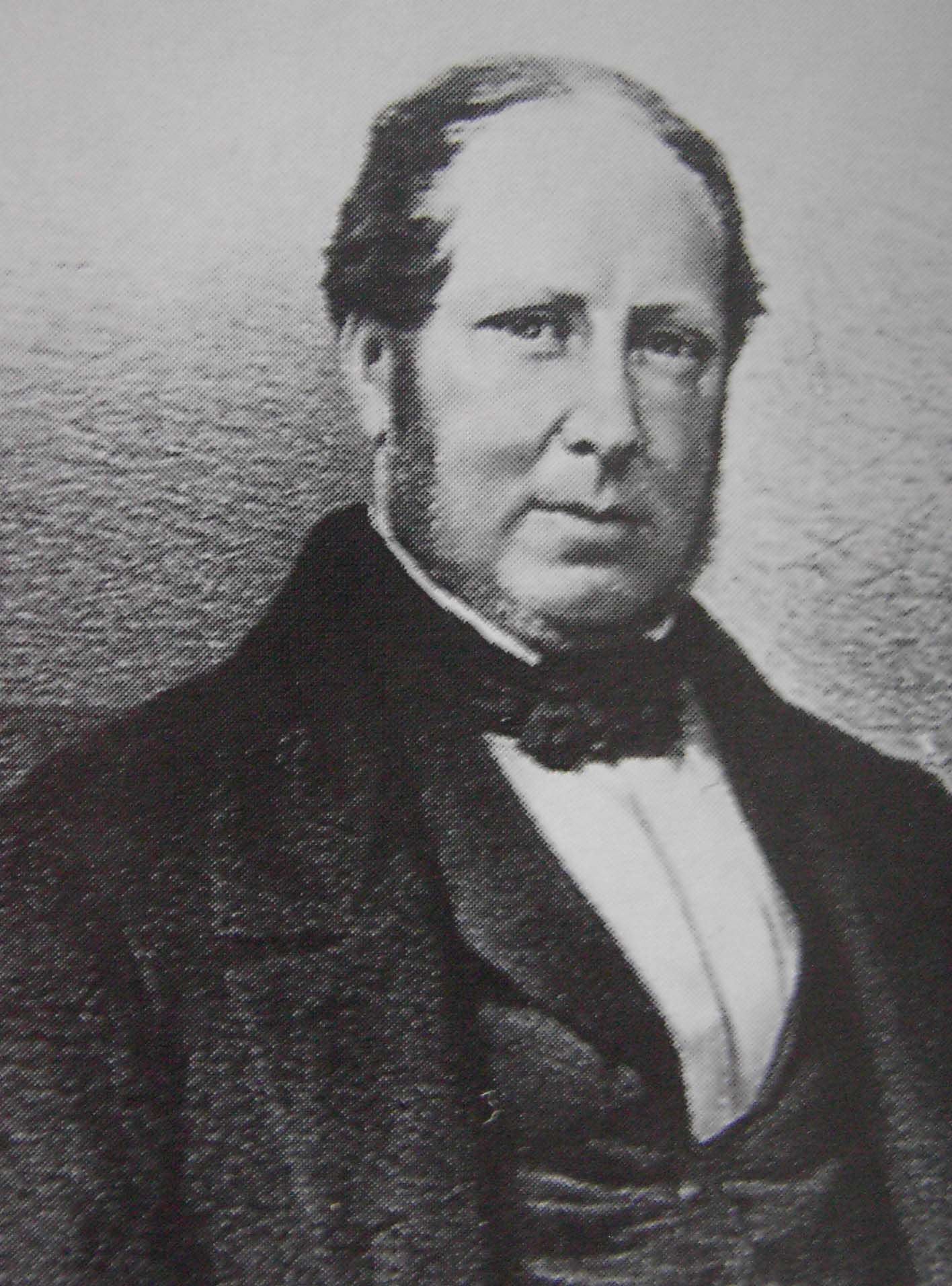 Ferdinand Lousbergs - Gent - Oost-Vlaanderen - België